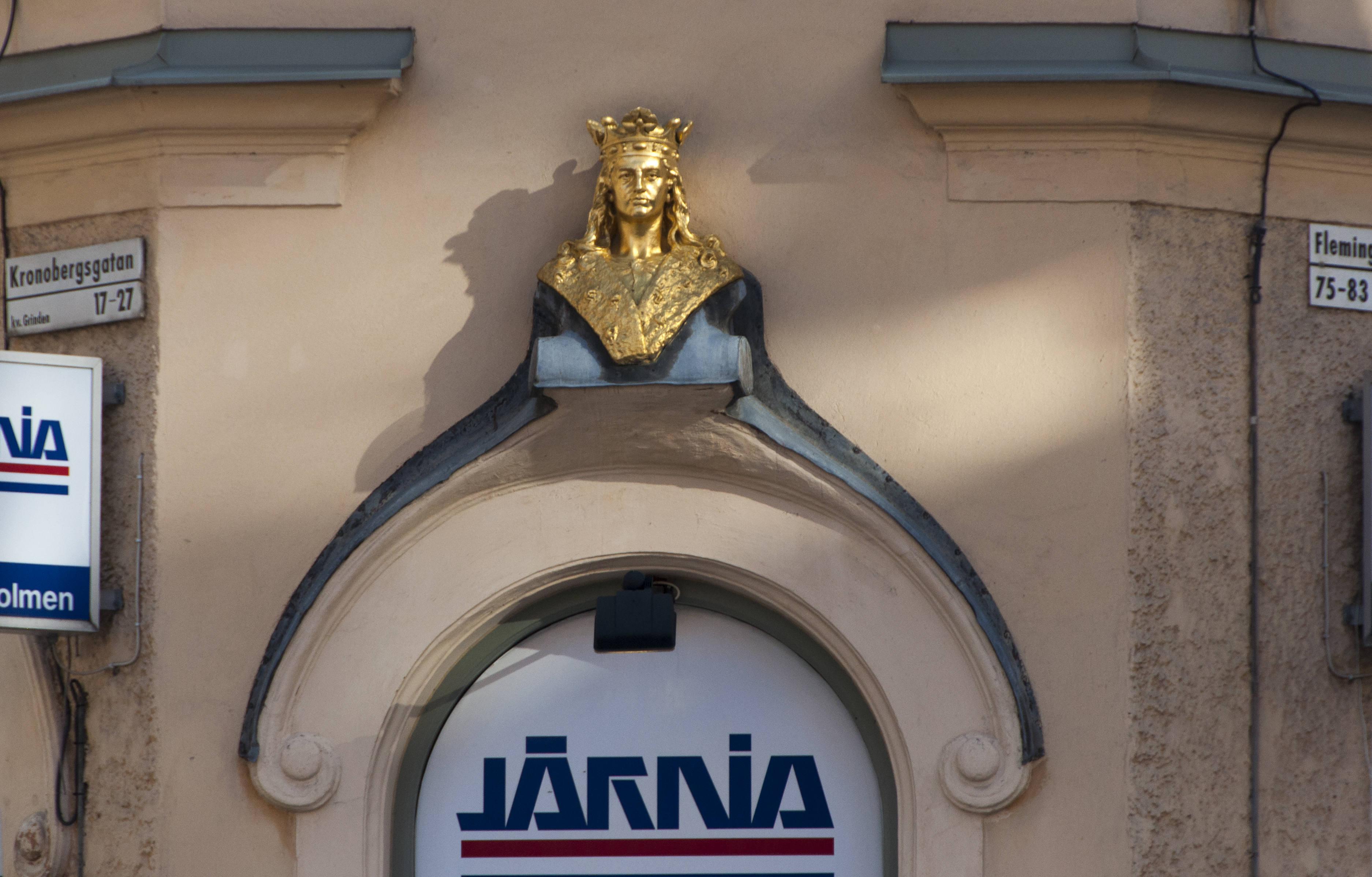 Portalfigur för Apoteket Sankt Erik som låg vid Fleminggatan 75 1903-1987